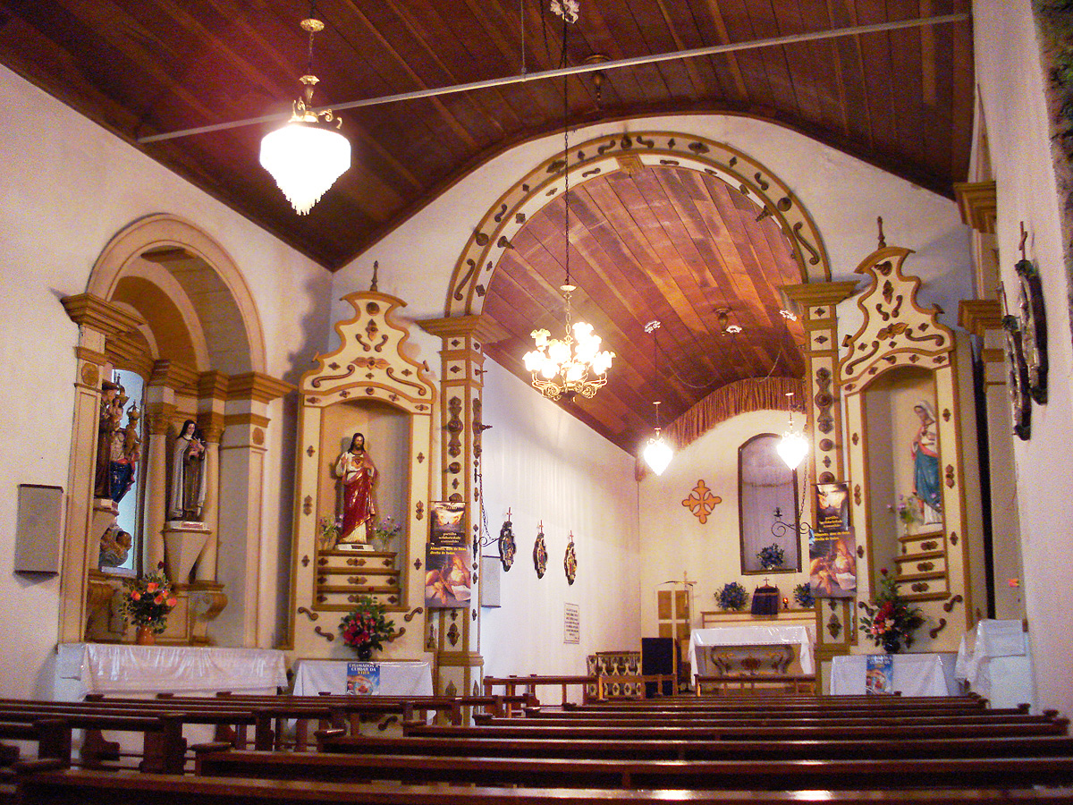 Interior da Igreja Bom Jesus (1754) em Triunfo, Rio Grande do Sul, Brasil.